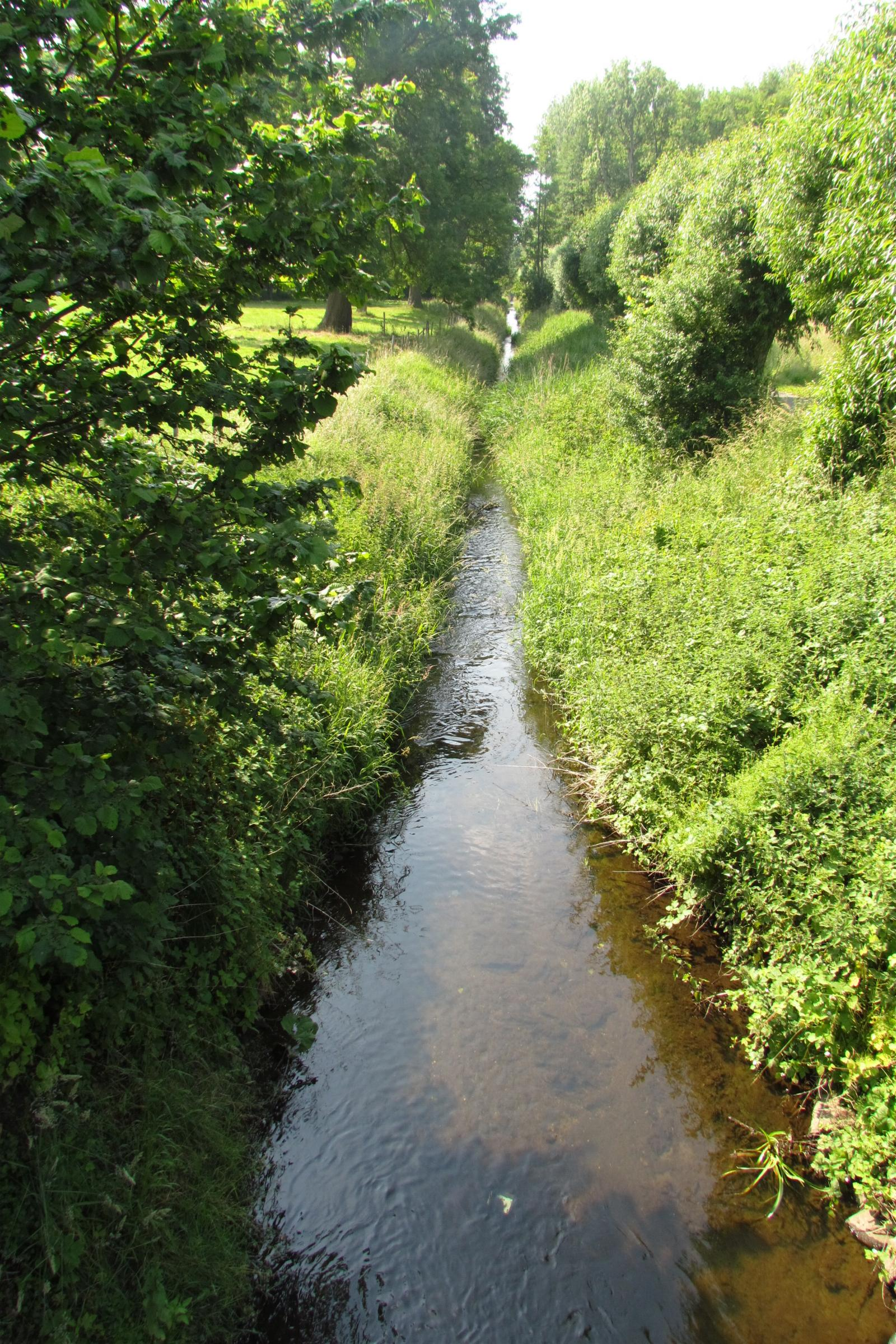 Rodebach in der Nahe der Wehrer Mühle